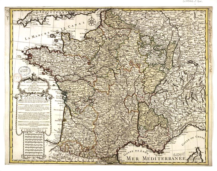 Carte de France divisee suivant les quatre departements de Messieurs les secretaires d'Etat